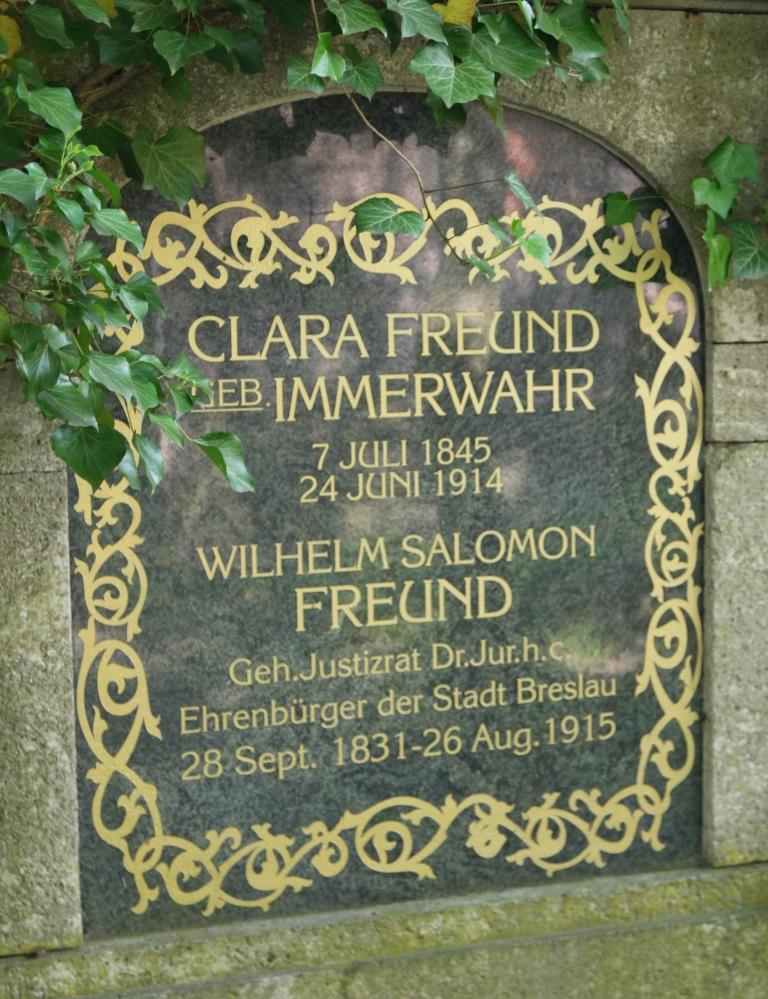 Grab des Juristen und Parlamentariers Wilhelm Salomon Freund (1831-1915) auf dem Alten Jüdischen Friedhof in Breslau